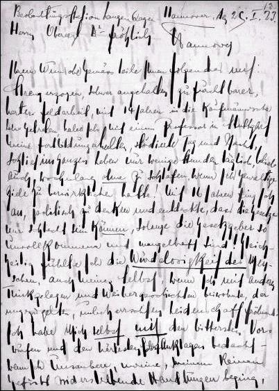 Schriftstück Ludwig Christian Haeusser